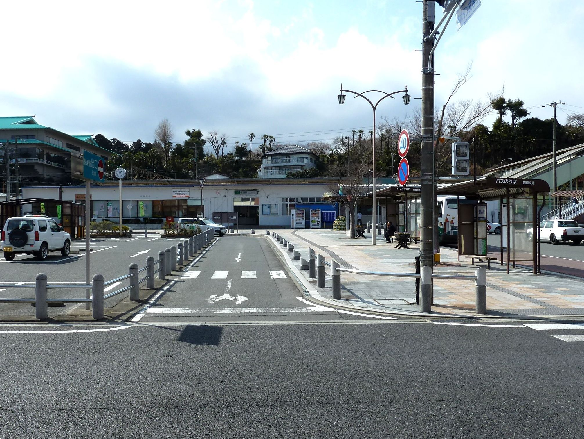 常磐線 植田駅